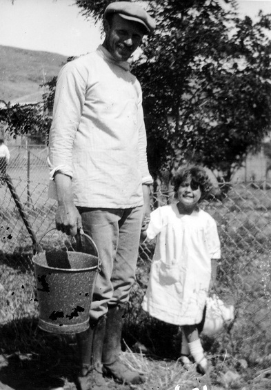 1920, חיים שטורמן ועמליה ישראלי (ביתם של חיה ובן ציון ישראלי)